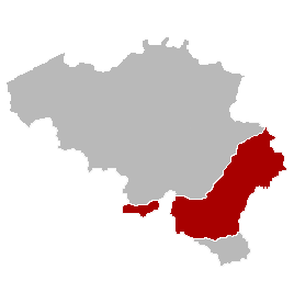 Dit is een geografische map van de Ardennen in België, door mezelf herwerkte foto.